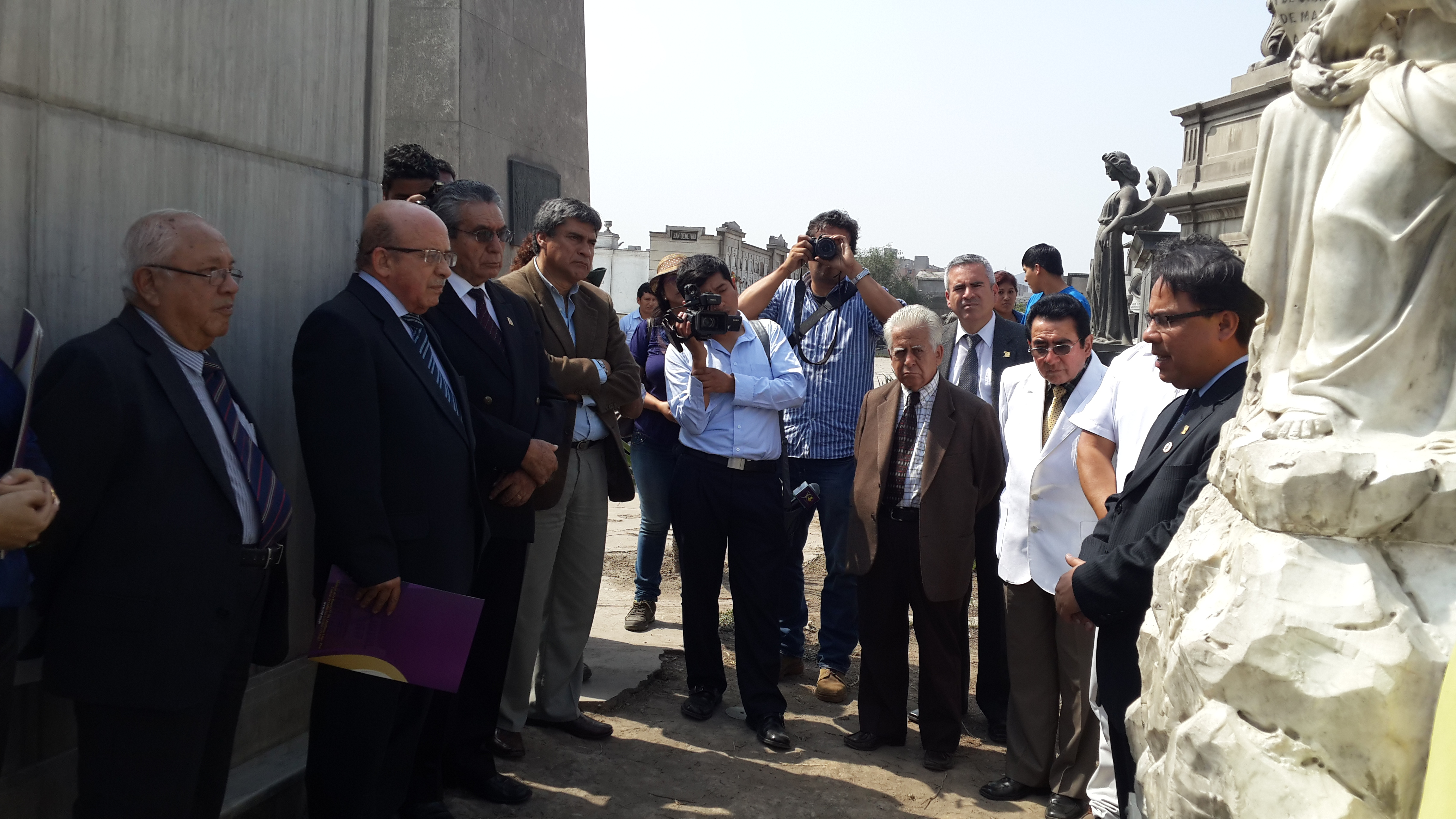 Romería a José Cayetano Heredia Sánchez